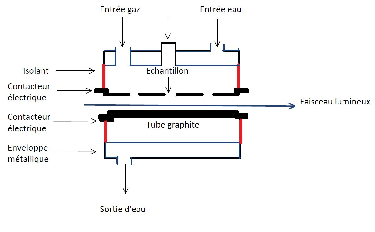 Schéma de l'instrument